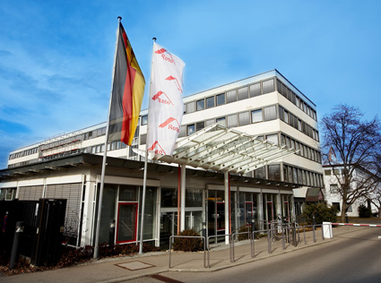 Roto Frank AG Stammsitz in Leinfelden - Echterdingen